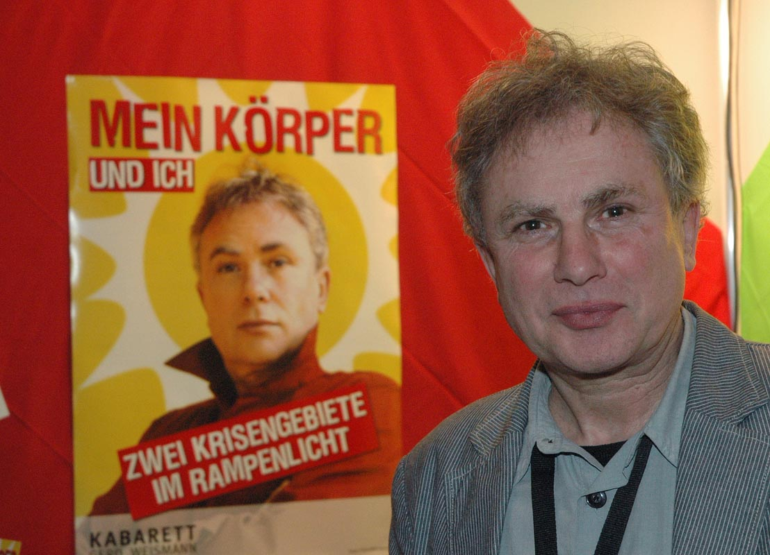 Gerd Weismann an seinem Stand auf der Freiburger Kulturbörse 2009